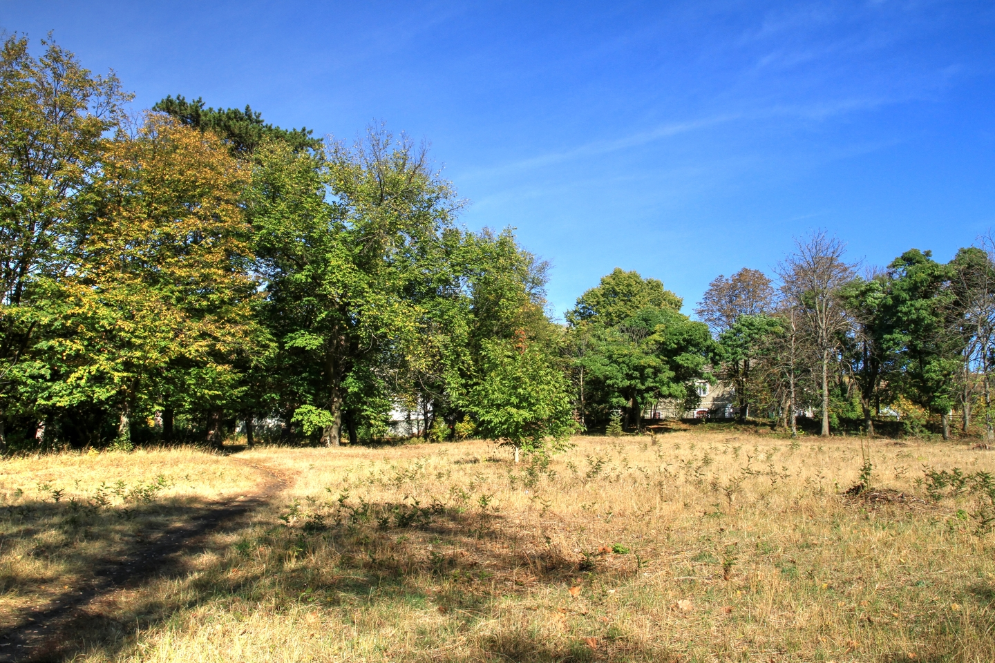 Милештский парк, монумент природы, находится в Ниспоренский район, с. Милешть (код MD-NS-map-016)